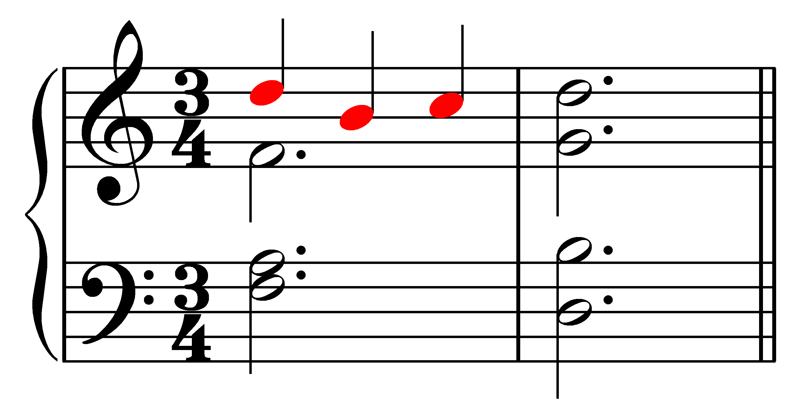 نت کامبیاتا